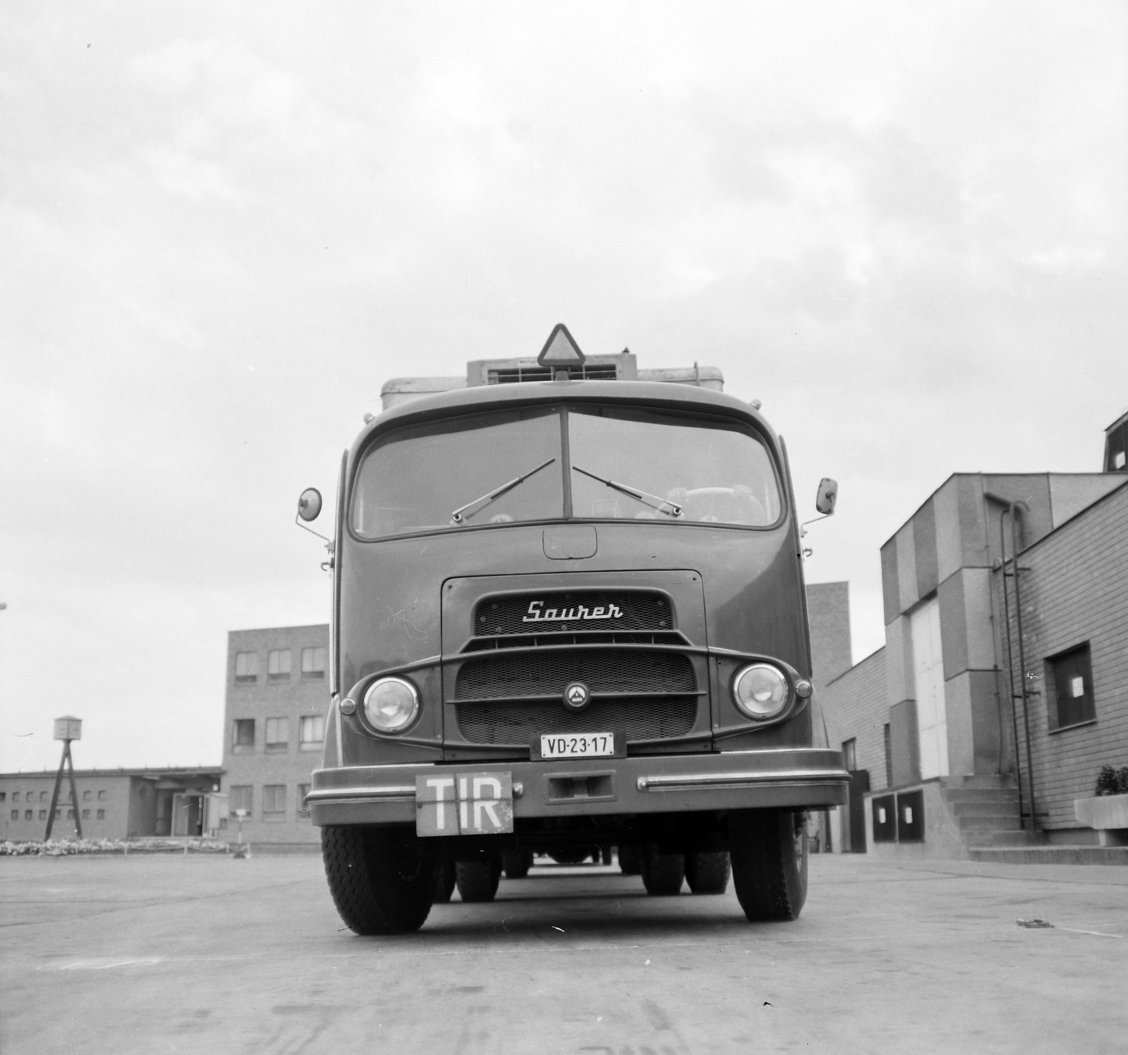 a 20 sz. AKÖV telephelye a Than Károly utca - Andor utca - Pajkos utca határolta területen. Location: Hungary, Budapest XI. Tags: Saurer brand, Budapest Title: a 20 sz. AKÖV telephelye a Than Károly utca - Andor utca - Pajkos utca határolta területen.